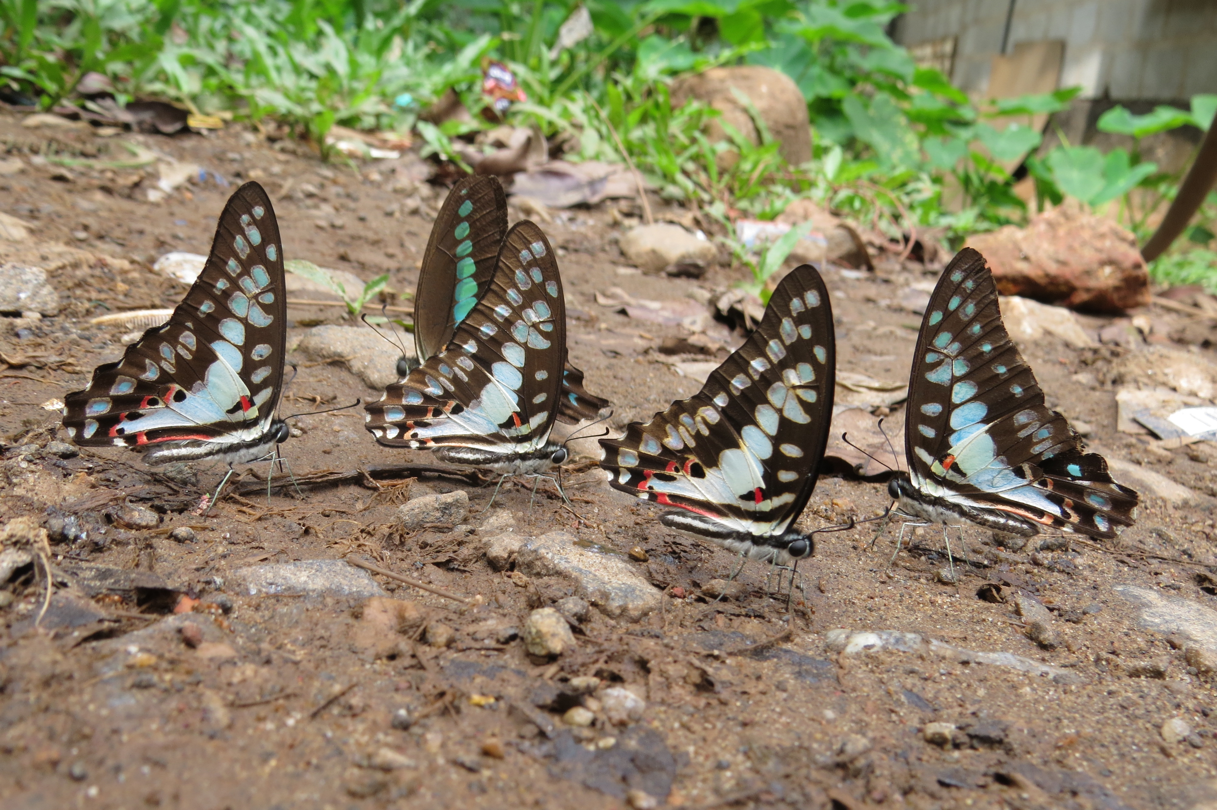 Photos by Vinayaraj